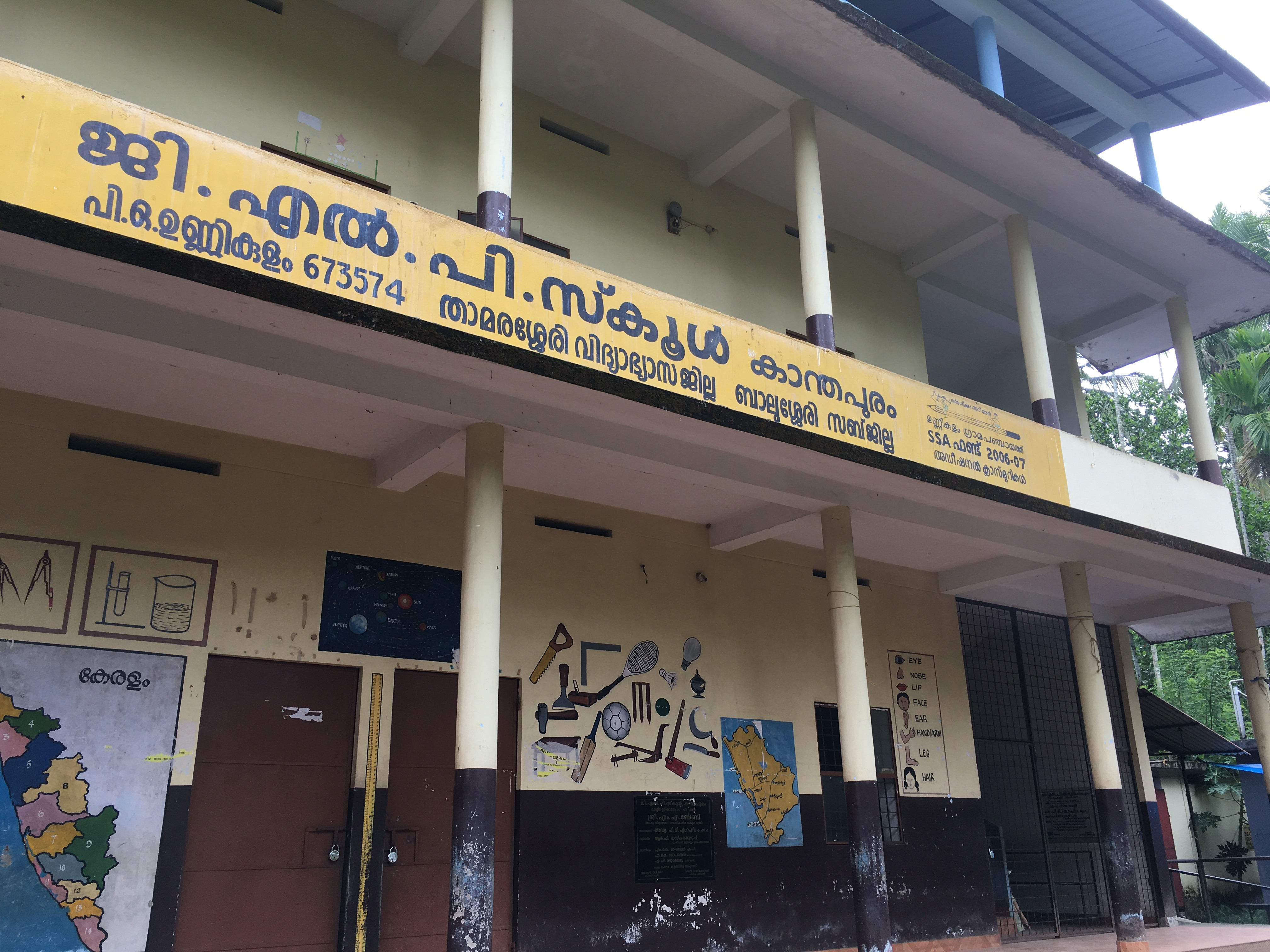 ജി‌എല്‍ പി സ്കൂള്‍ കാന്തപുരം